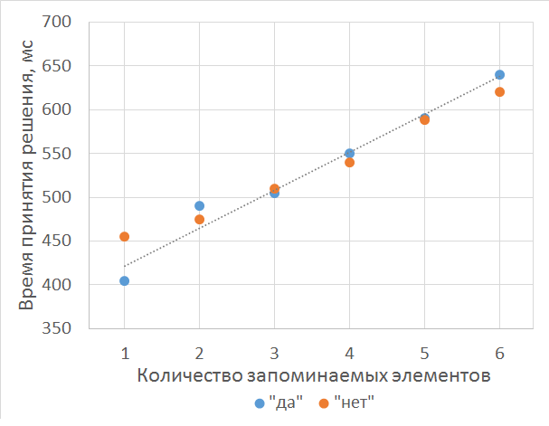 Результаты исследования Сола Стернберга 1966 года.